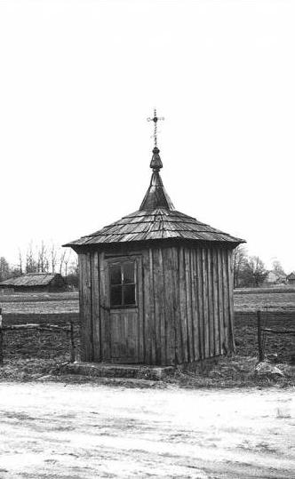 kaplicia po dorozi na mohiłki